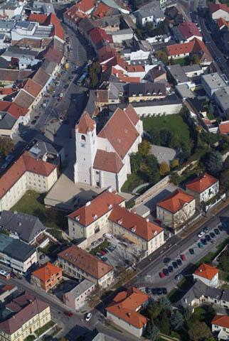 Eisenstadt, Austria, aerialphotography